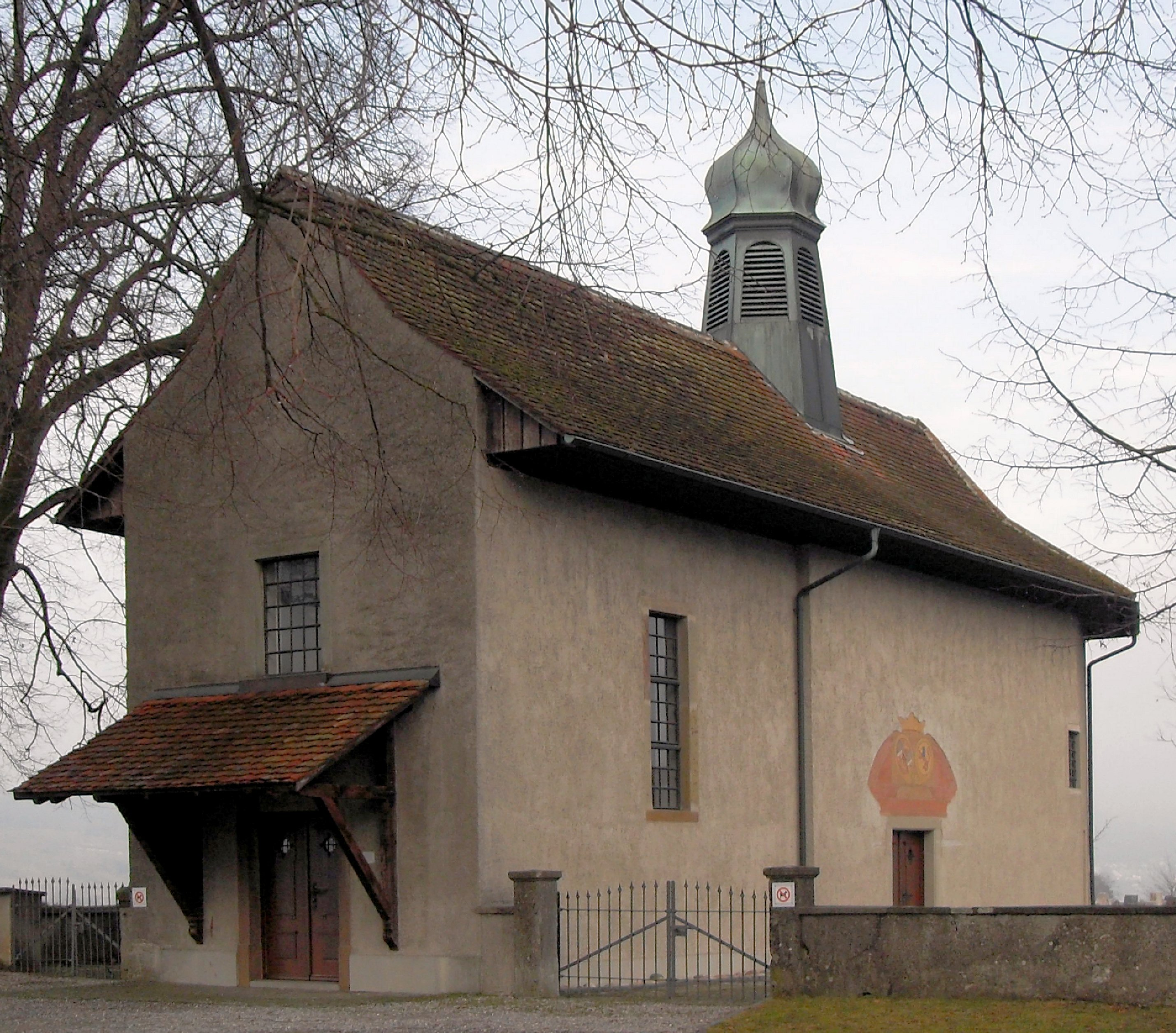 Loretokapelle in Leibstadt, Kanton Aargau, Schweiz